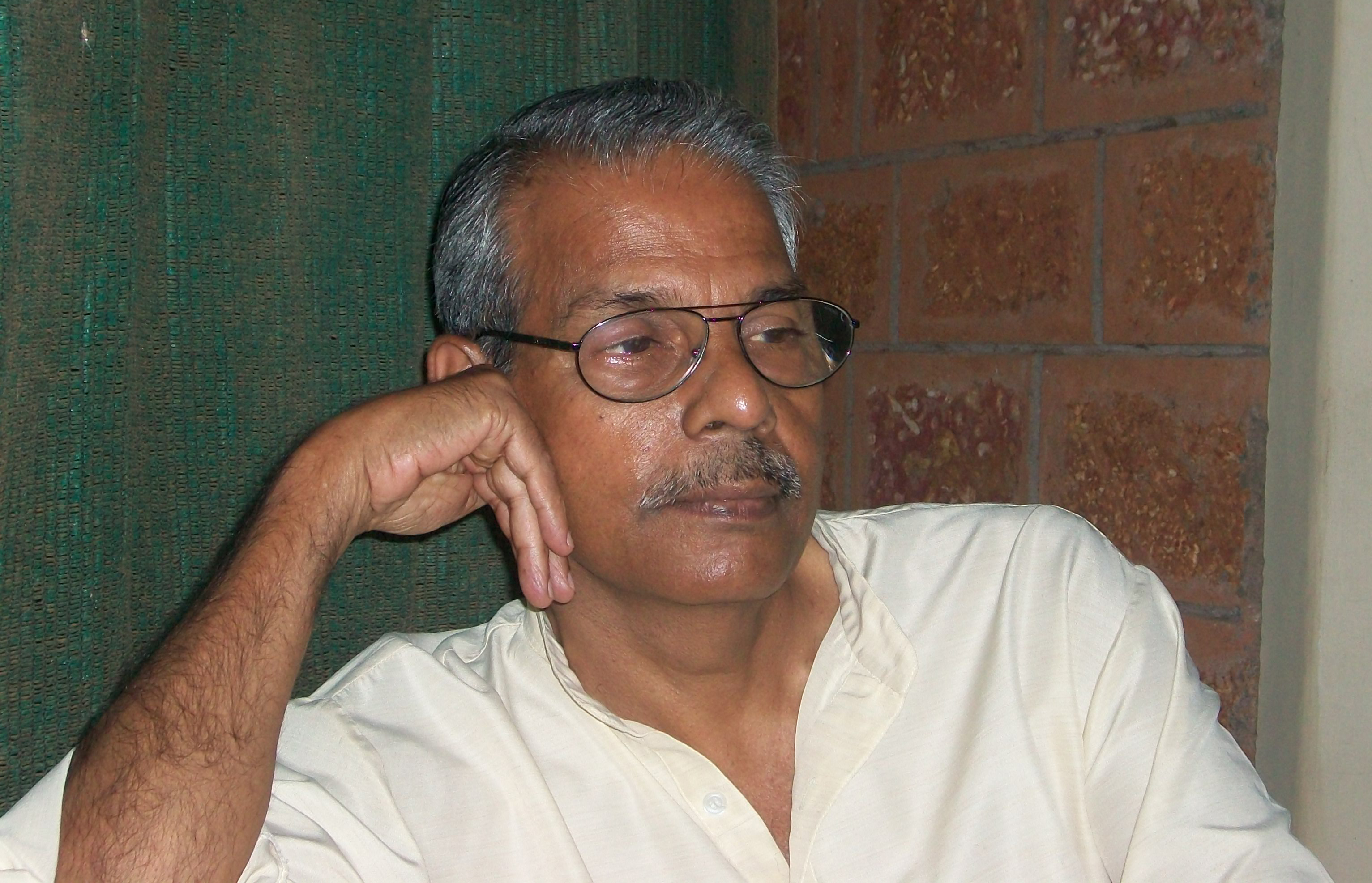 സി. രാധകൃഷ്ണൻ